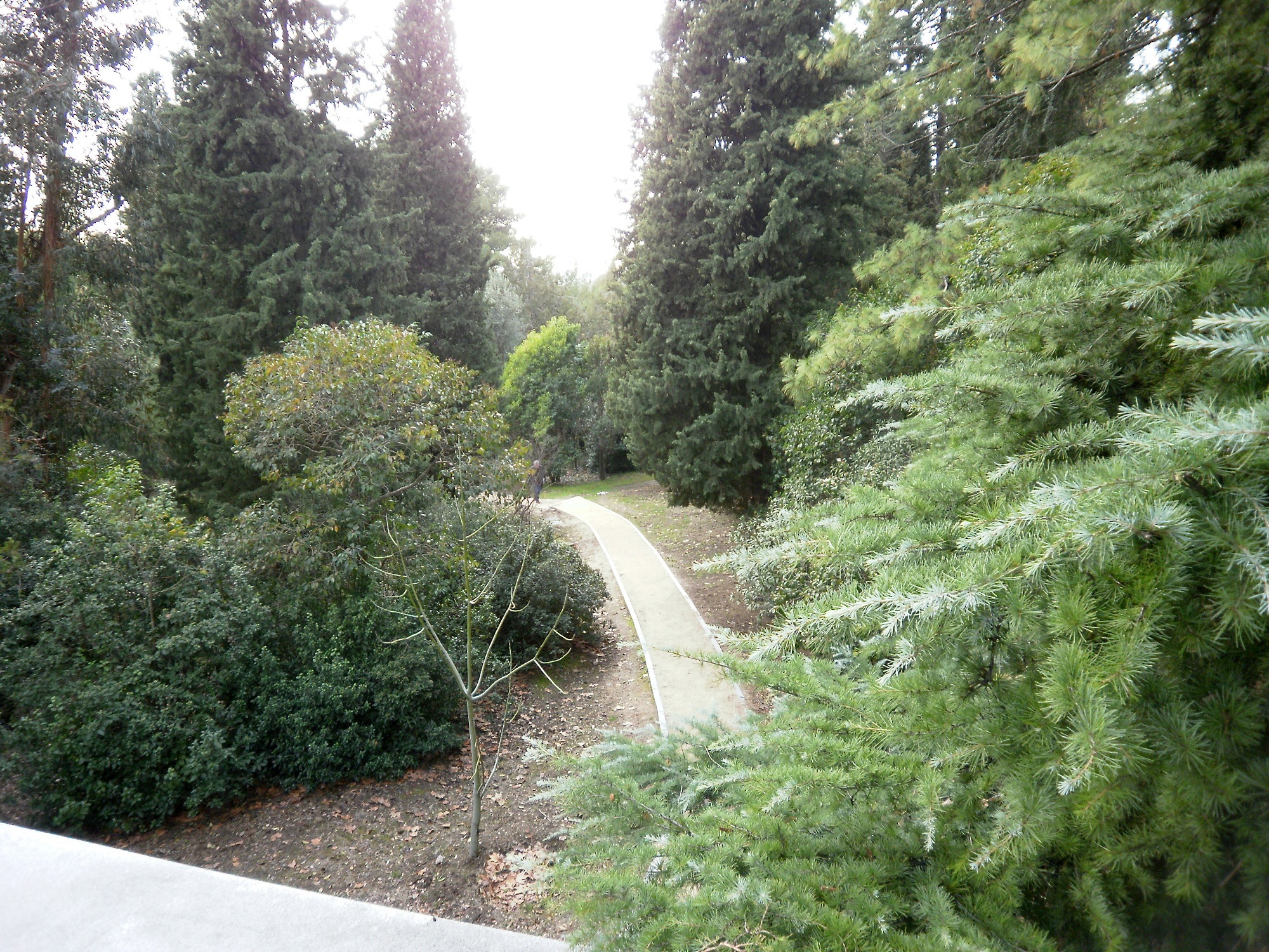 Una vista del Arboreto de la ETSI de Montes de la Universidad Politécnica de Madrid